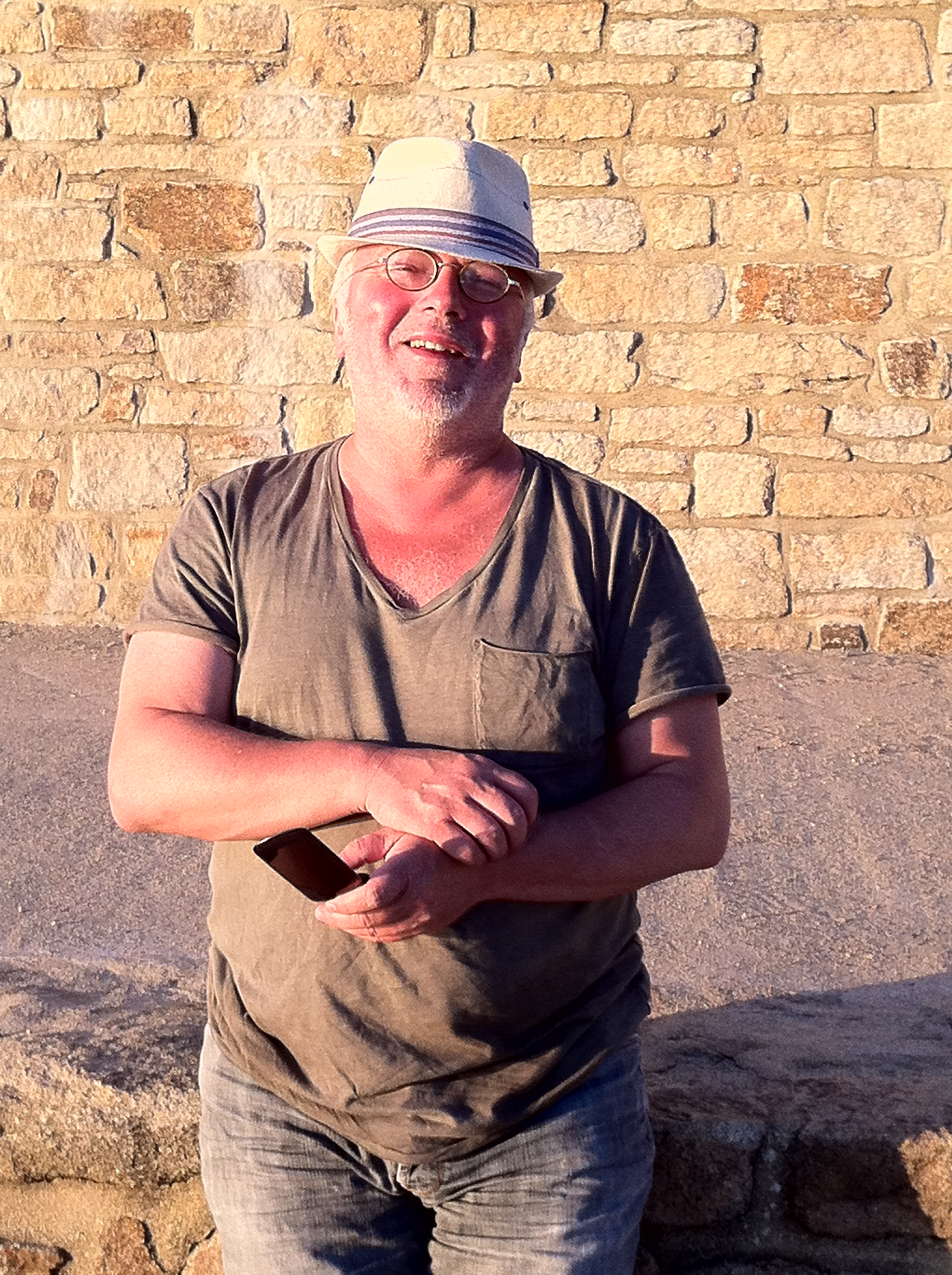 Pierre-Louis Basse en Bretagne